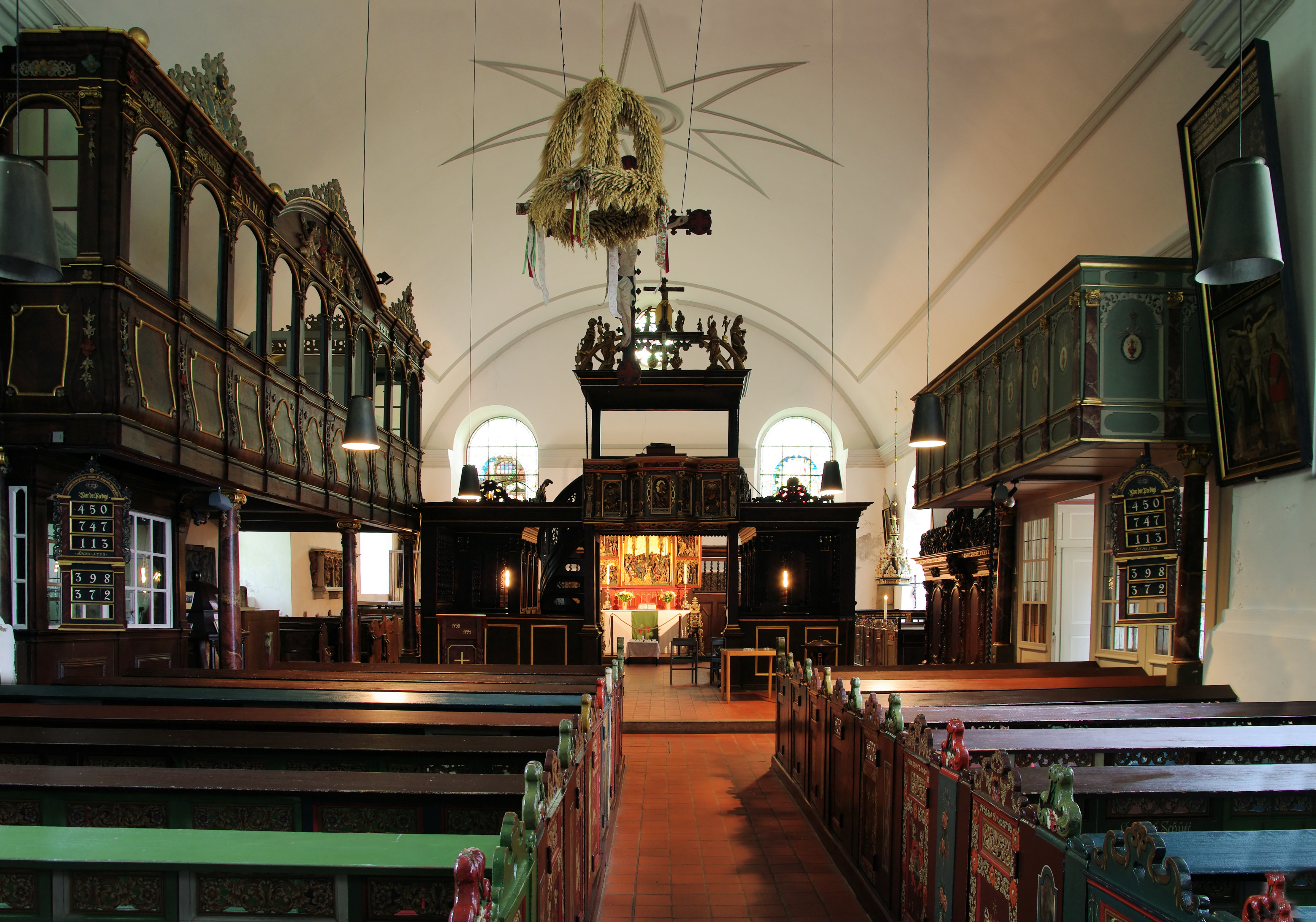 St. Nicolai, Altenbruch: Blick in den Kirchenraum mit den 2 Emporen